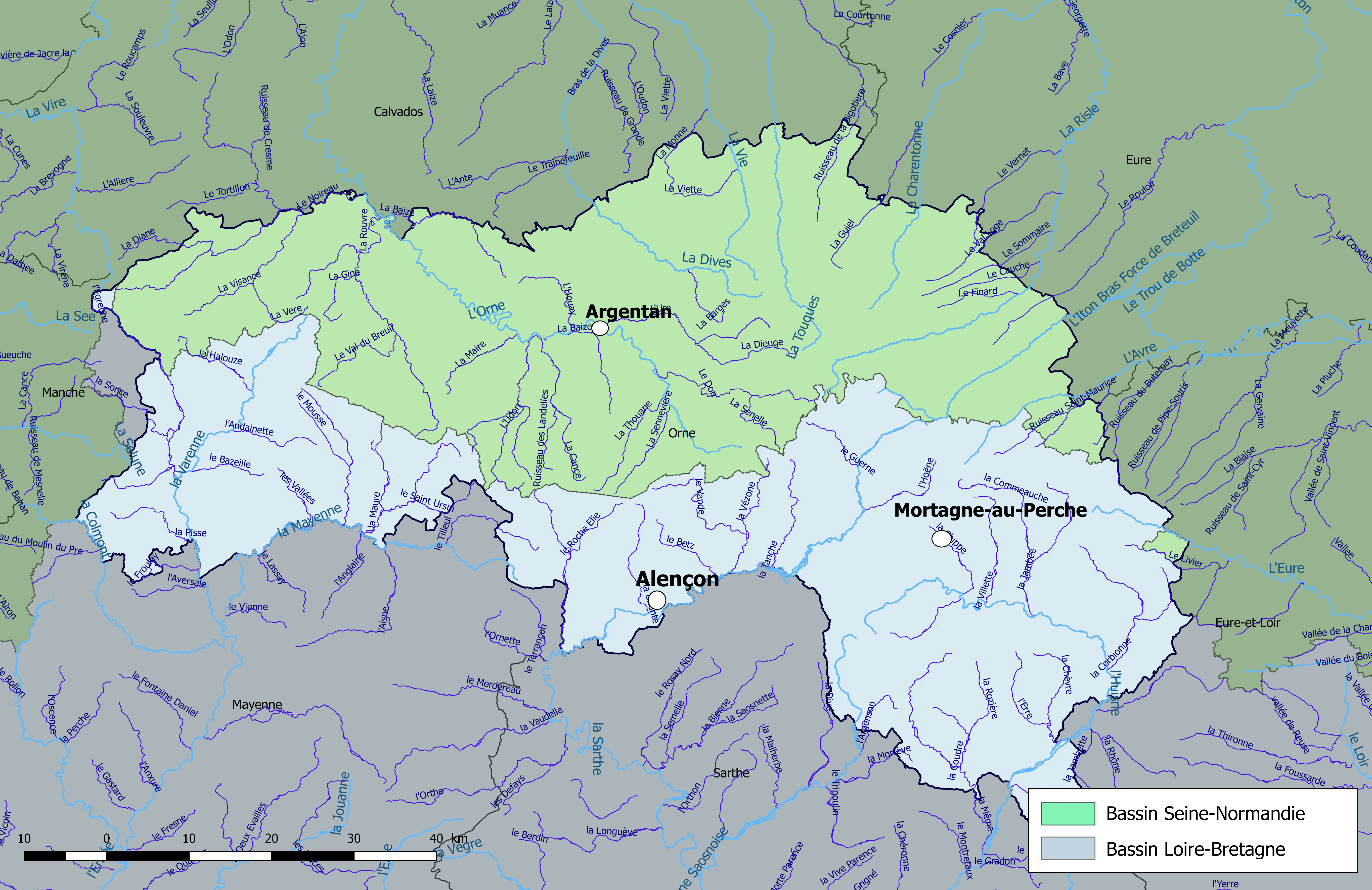 Cours d'eau de longueur supérieure à 10 km et plans d'eau dans le département de l'Orne (France) et représentation des bassins versants.